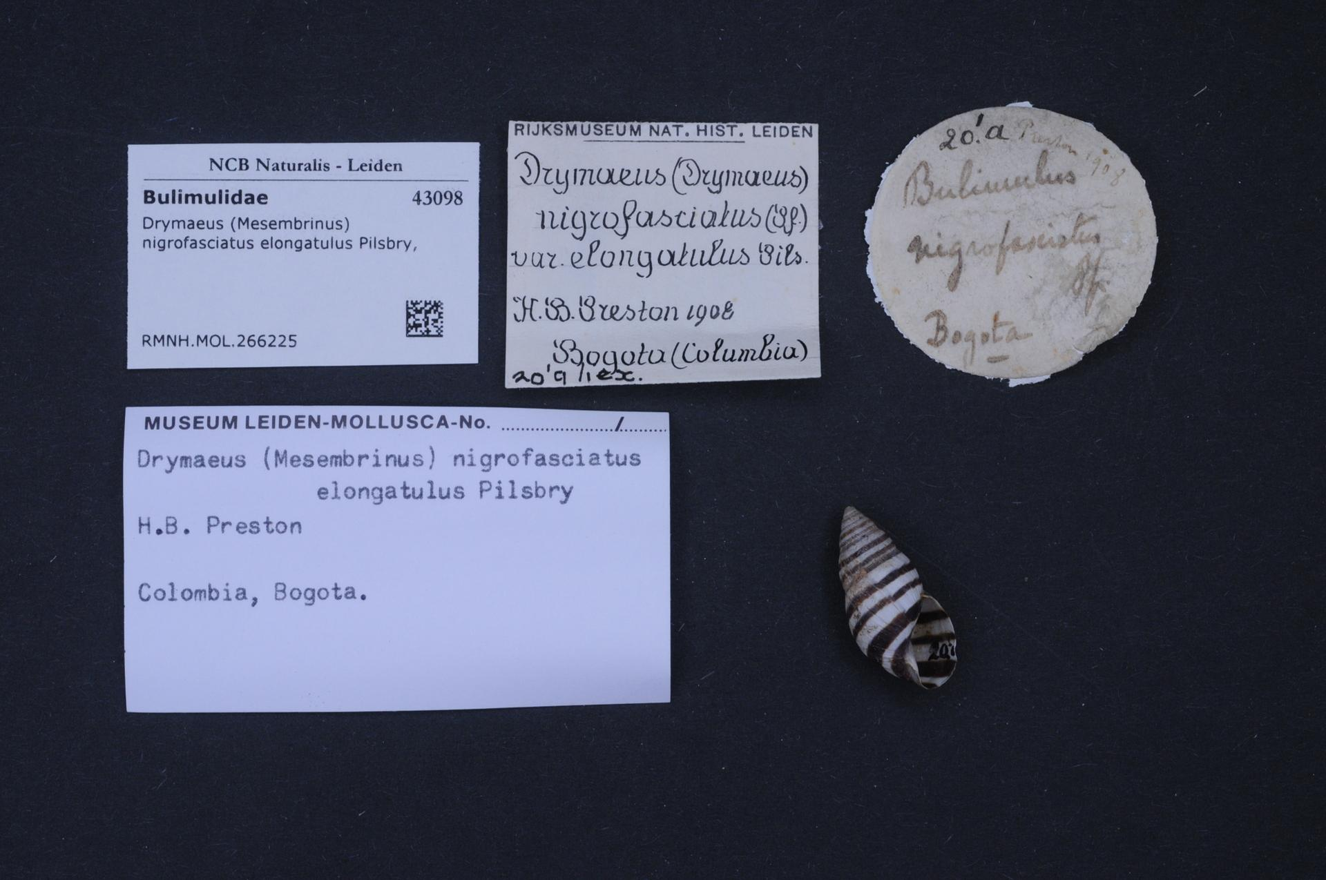 Drymaeus (Mesembrinus) nigrofasciatus elongatulus Pilsbry, 1898